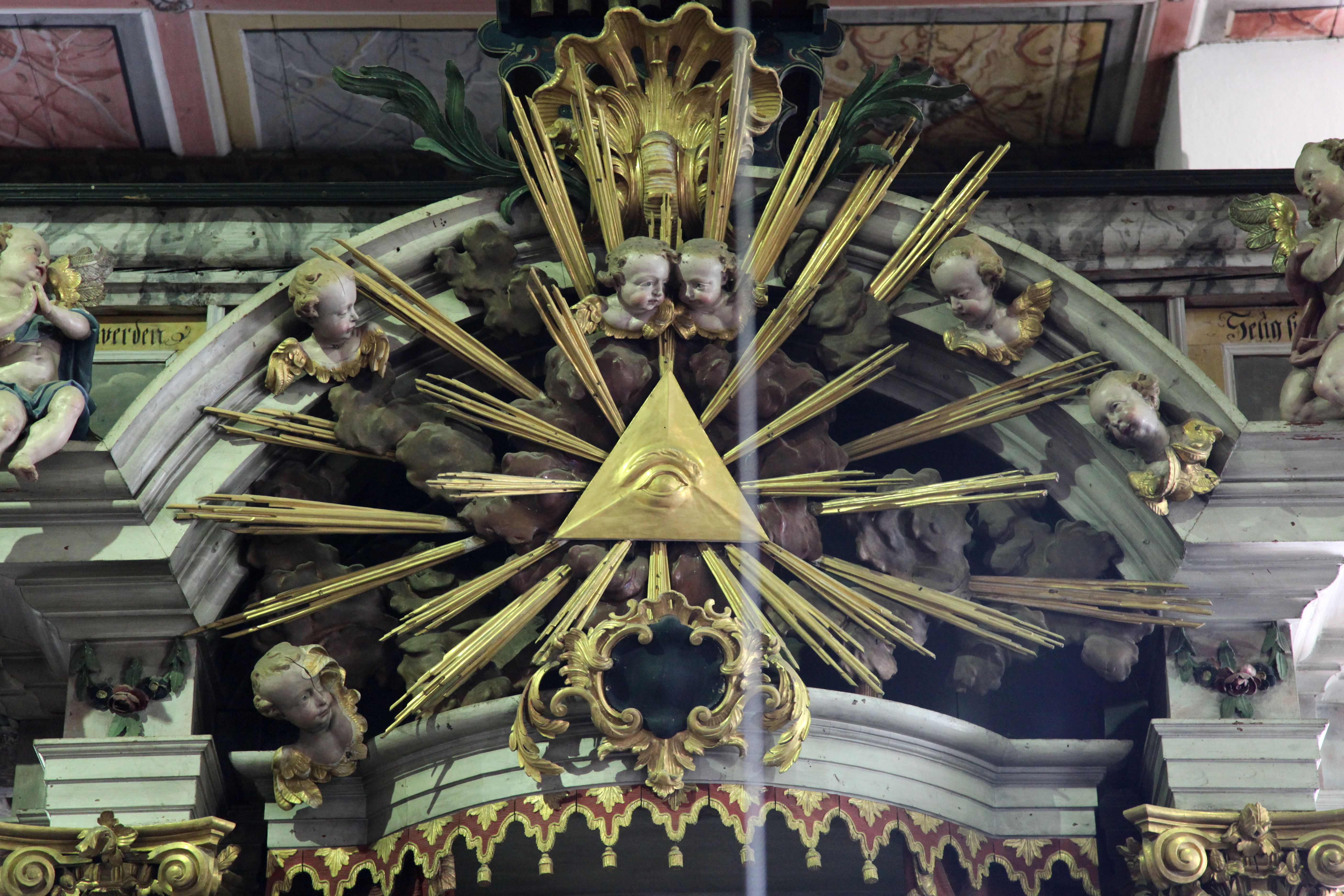 Bergkirche an der Hauptstraße in Oybin